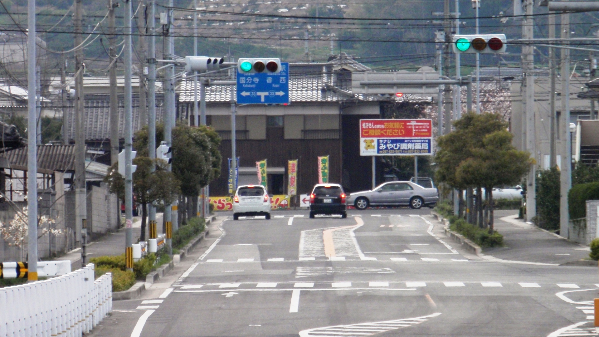 香川県高松市の市道木太鬼無線の終点部分である藤井交差点。